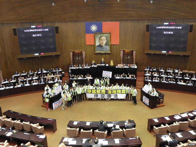 民主進步黨立法院黨團於立法院會議訴求停建核四、凍結核四預算、修改公民投票法。